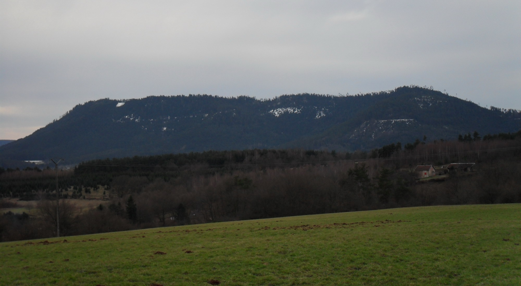 Aperçu du massif du Kemberg au sud de Saint-Dié depuis les collines des Hautes-Fosses (Nayemont-les-Fosses) surplombant la vallée de la Fave près de sa confluence avec la Meurthe, photo numérique réduite